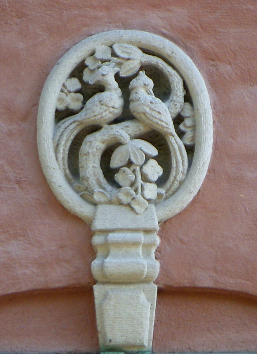 Tillbergska villan i Diplomatstaden i Stockholm, detalj över fönster